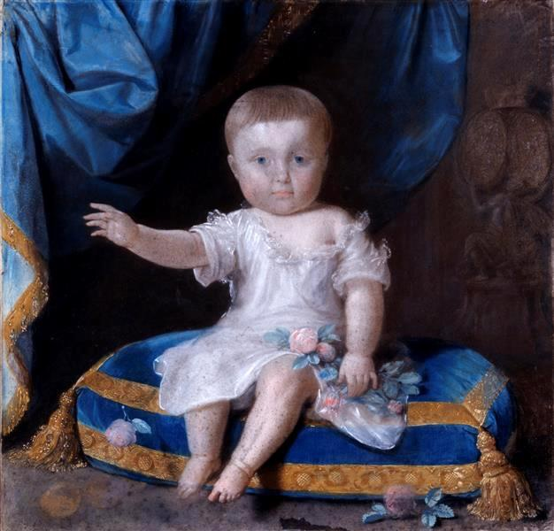 Prinzessin Augusta von Sachsen als Kind